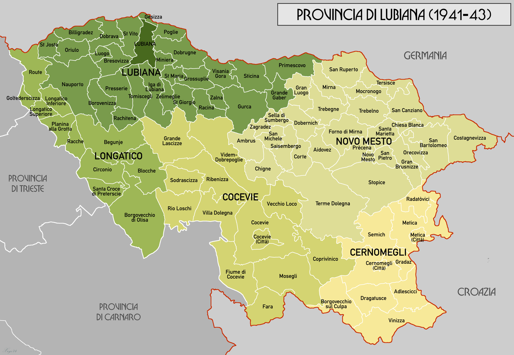 Mappa amministrativa della Provincia di Lubiana (1941-1943). Origine dati da Volkstumskarte von Jugoslawien, Wilfried Krallert (1941). Dati dell'unità di " Fascism's European empire: Italian occupation during the Second World War", Davide Rodogno (2006)